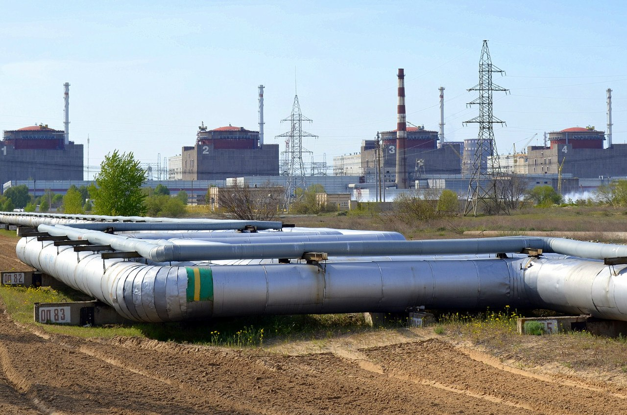 Станция